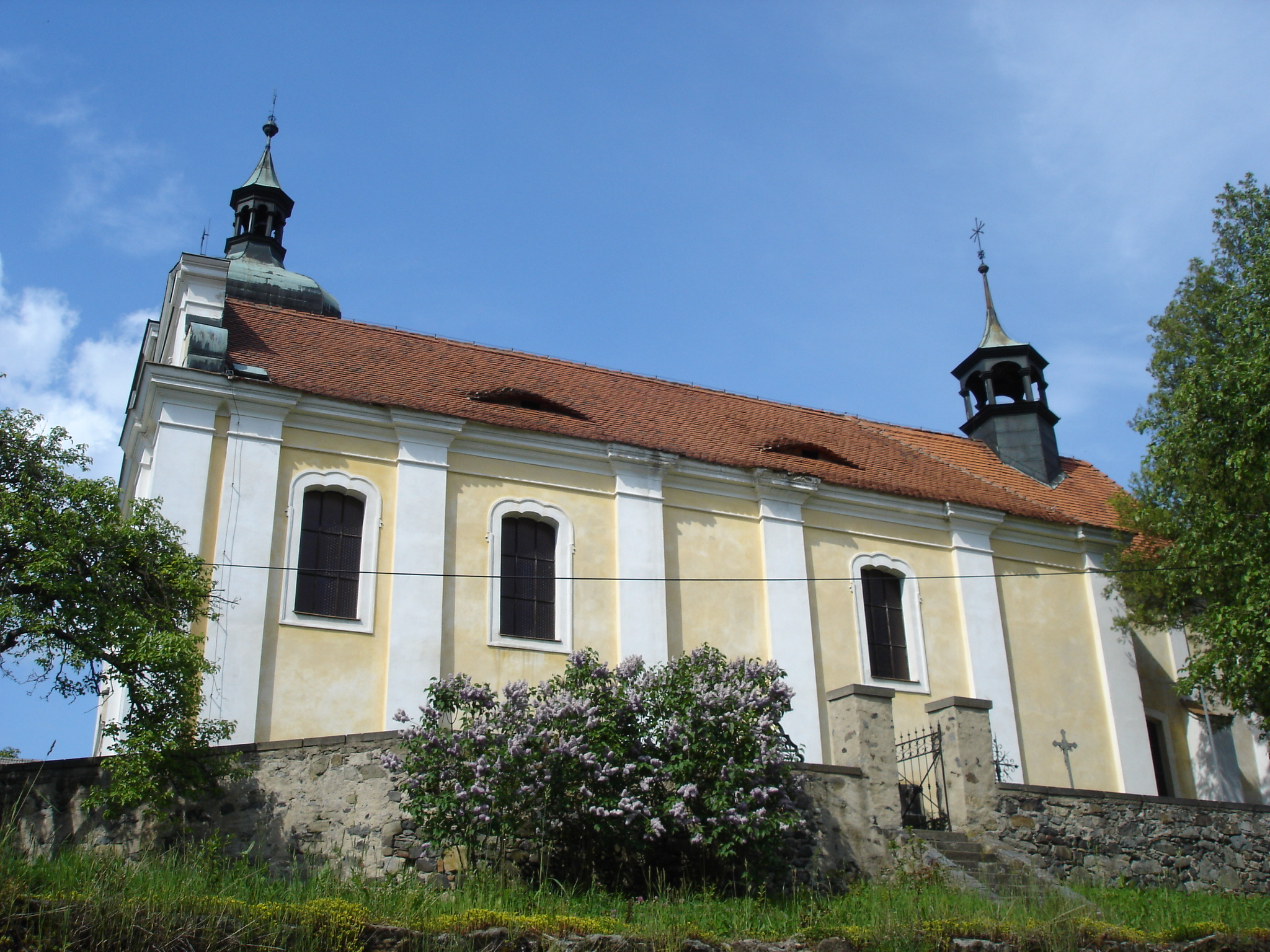 Kostel Sv. Máří Magdalény, Zubrnice, okres Ústí nad Labem